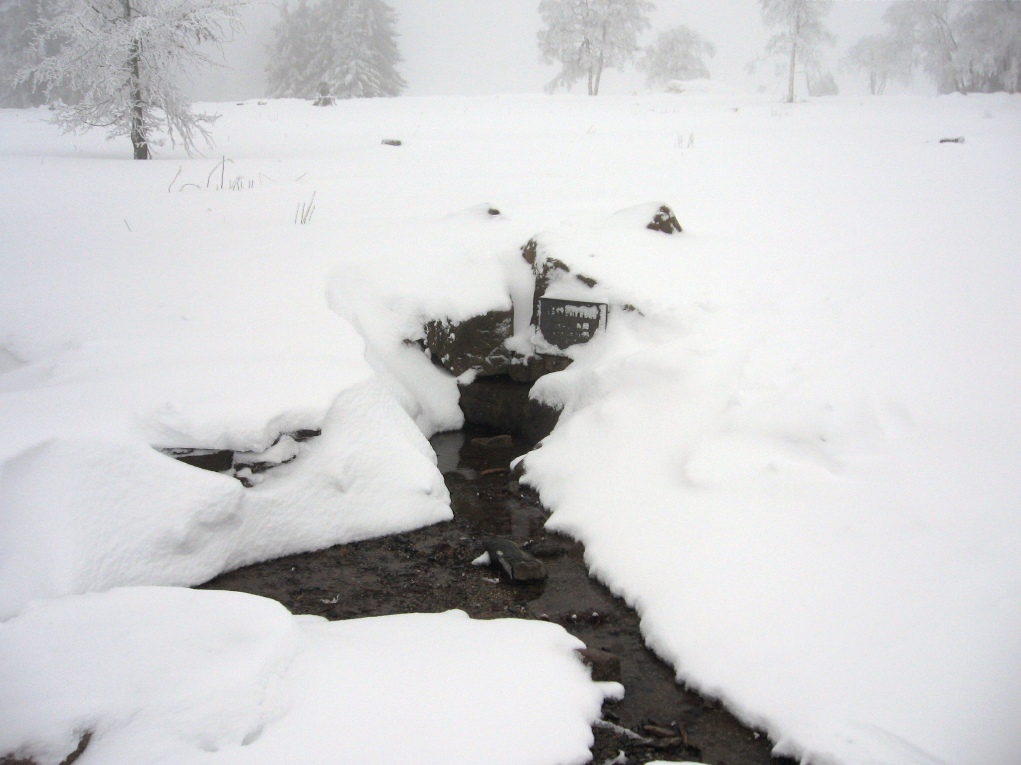 Lennequelle auf dem Kahlen Asten im Winter 2011.